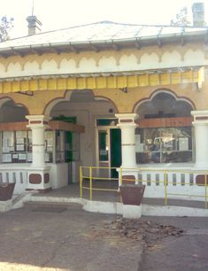 Primăria comunei Mihail Kogălniceanu, Tulcea